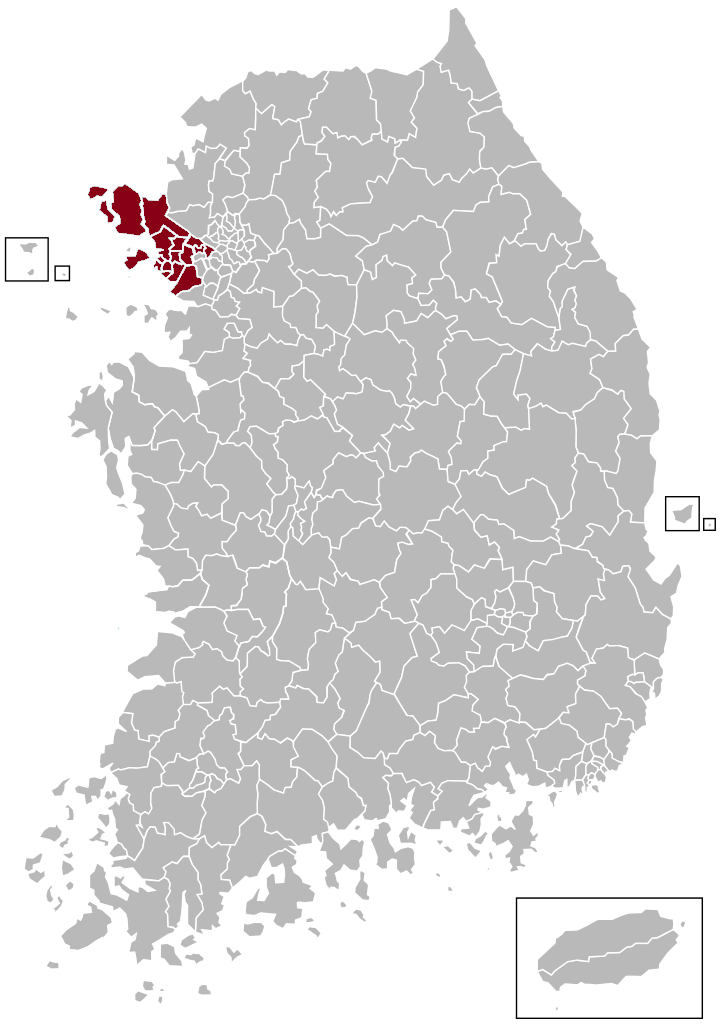 부천우편집중국 관할구역 지도